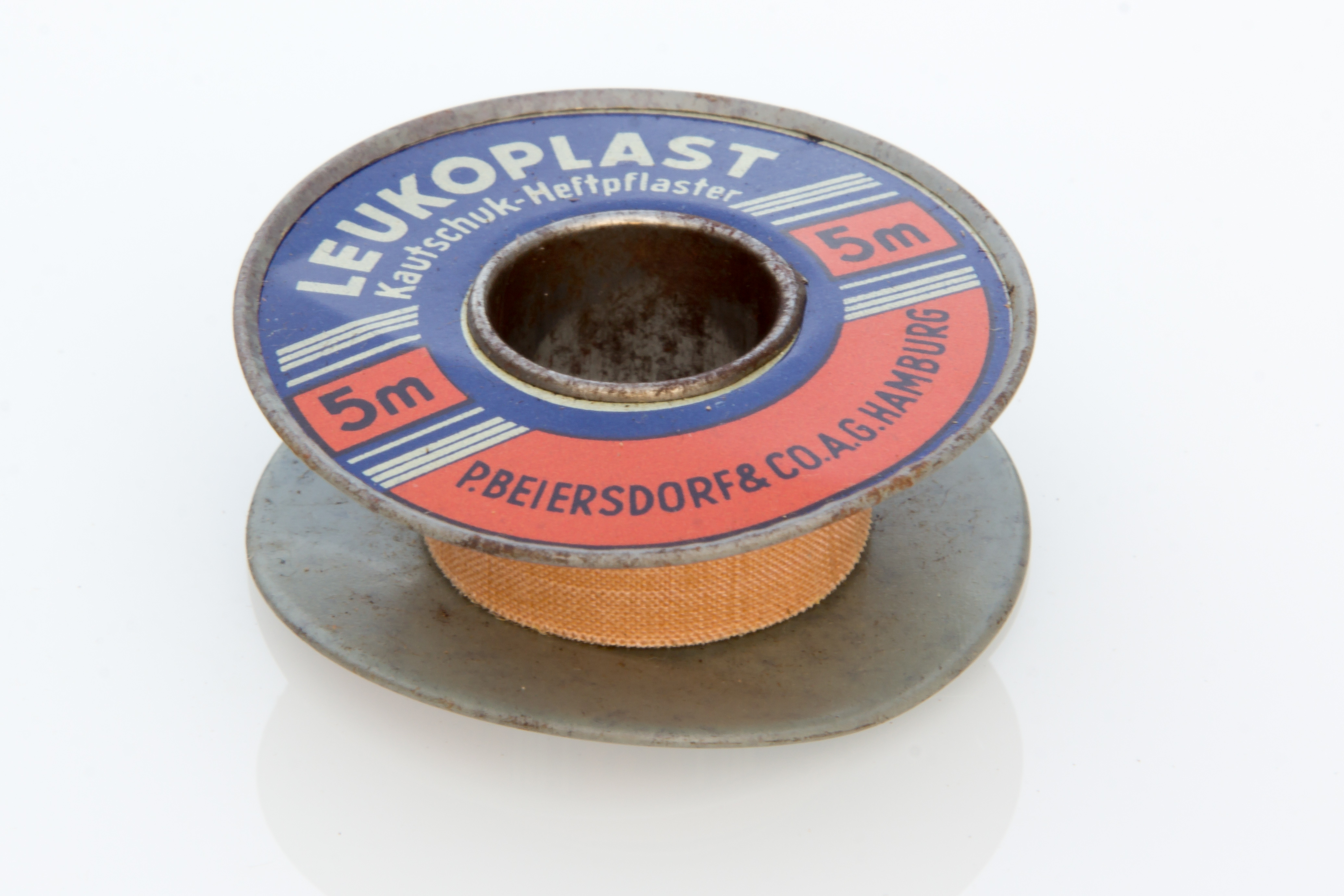 Leukoplastrolle aus einer Rotkreuzhelfertasche der 1930er Jahre